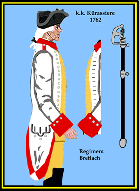 Österreichisches Kürassier-Regiment „Bretlach“ (Aus: L.& F. Funcken - „L'Uniforme et les Armes des soldats de la guerre en dentelle II“) Castermann (Tournai 1976)